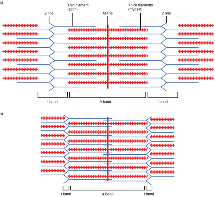 Functional of muscle